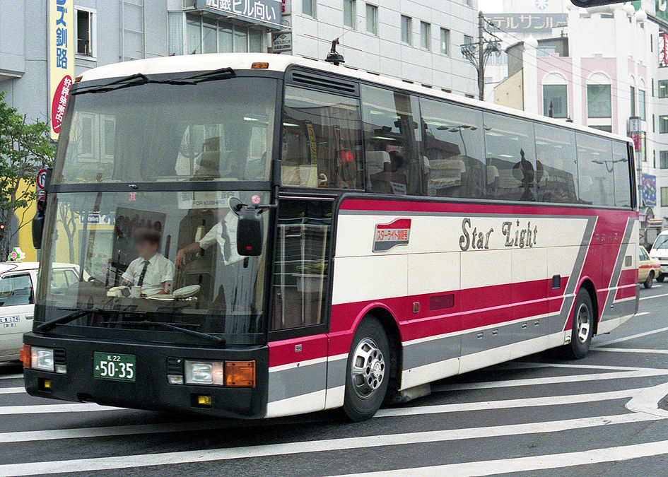 北海道中央バス スターライト釧路 三菱ふそう P-MS725S改 エアロクィーンK